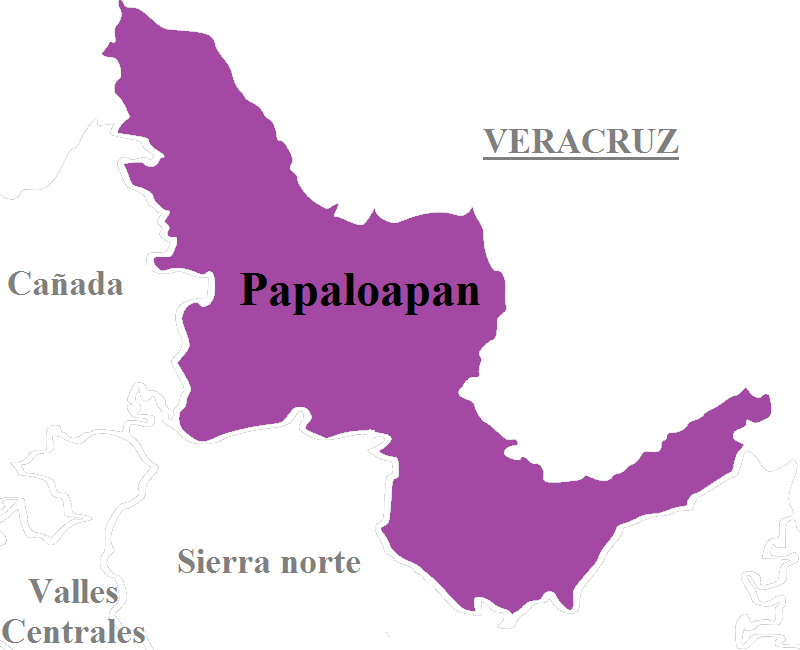 Región Papaloapan, una de las ocho regiones que conforman al estado mexicano de Oaxaca.